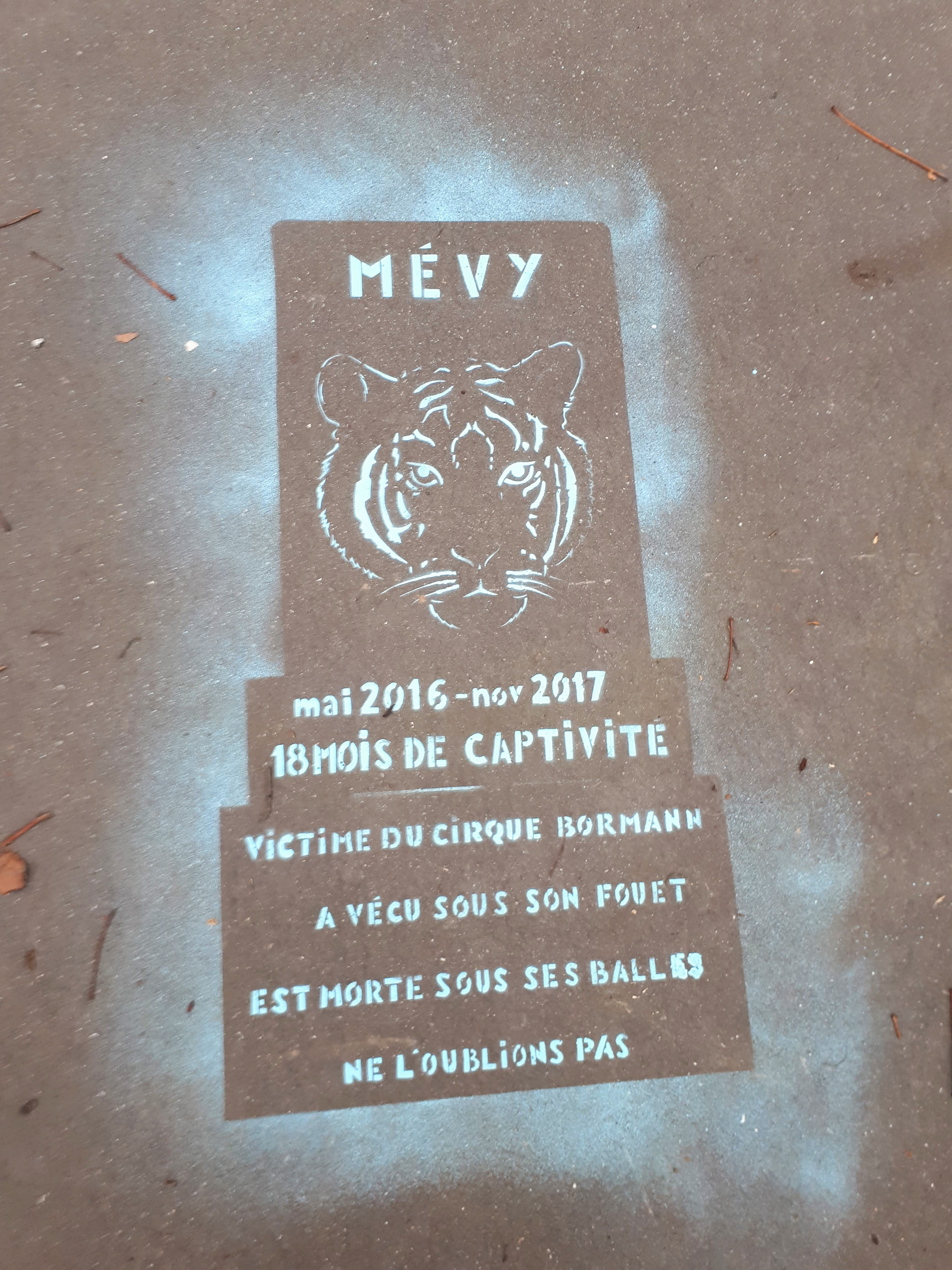 Tag sur le trottoir du boulevard Valin à Paris (15e arrondissement), derrière le cirque Bormann-Moreno, en hommage au tigre Mévy échappé et abattu en novembre 2017.